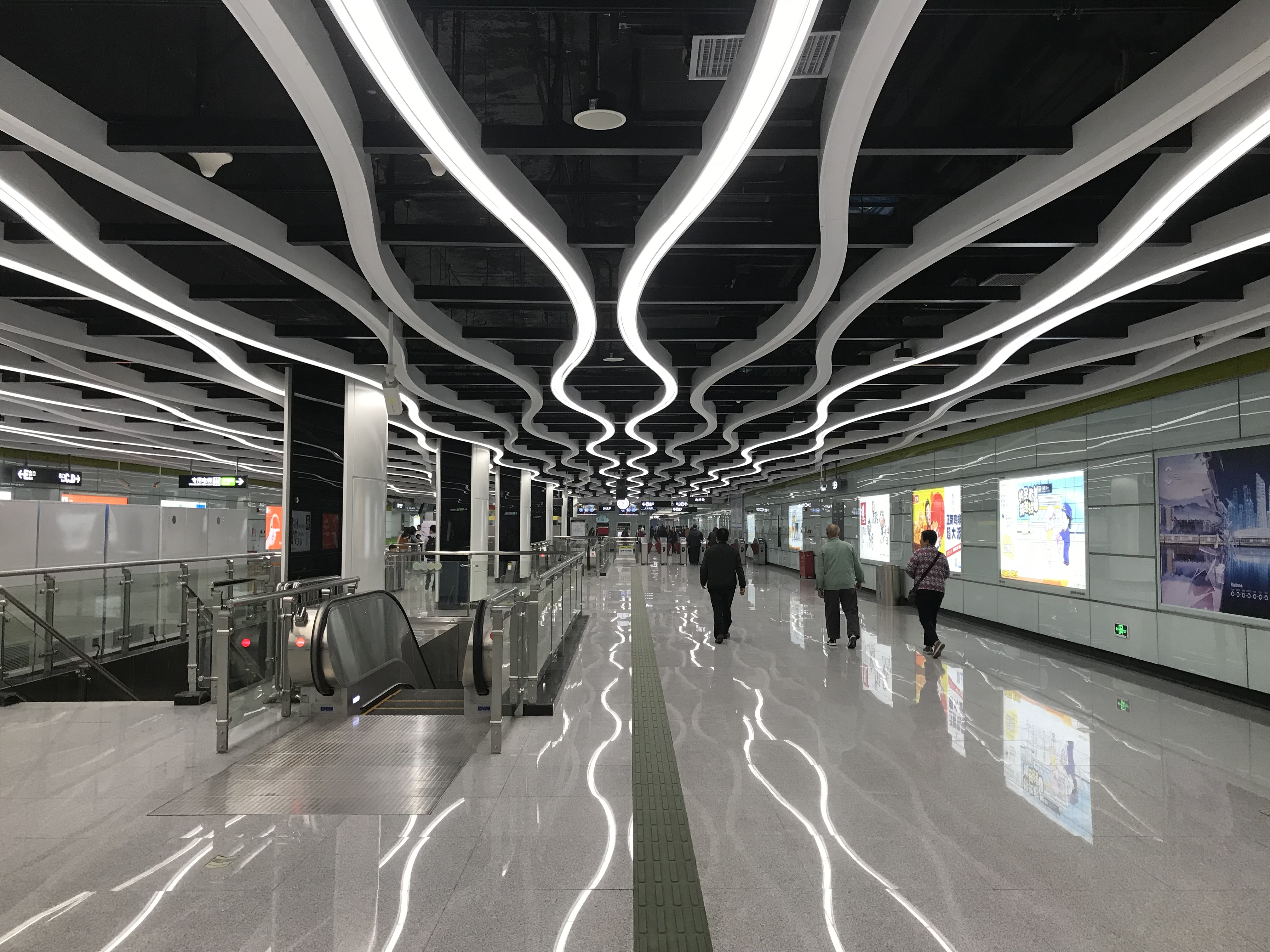 广州地铁南岗站